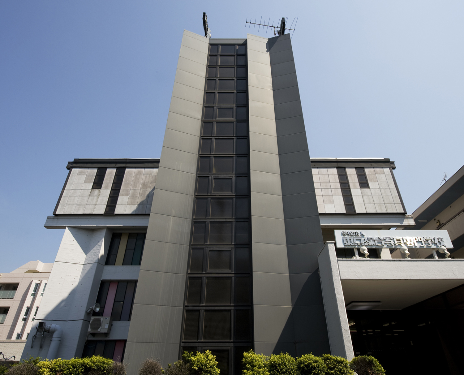 東京綜合写真専門学校の建物。正面から、2012年撮影。